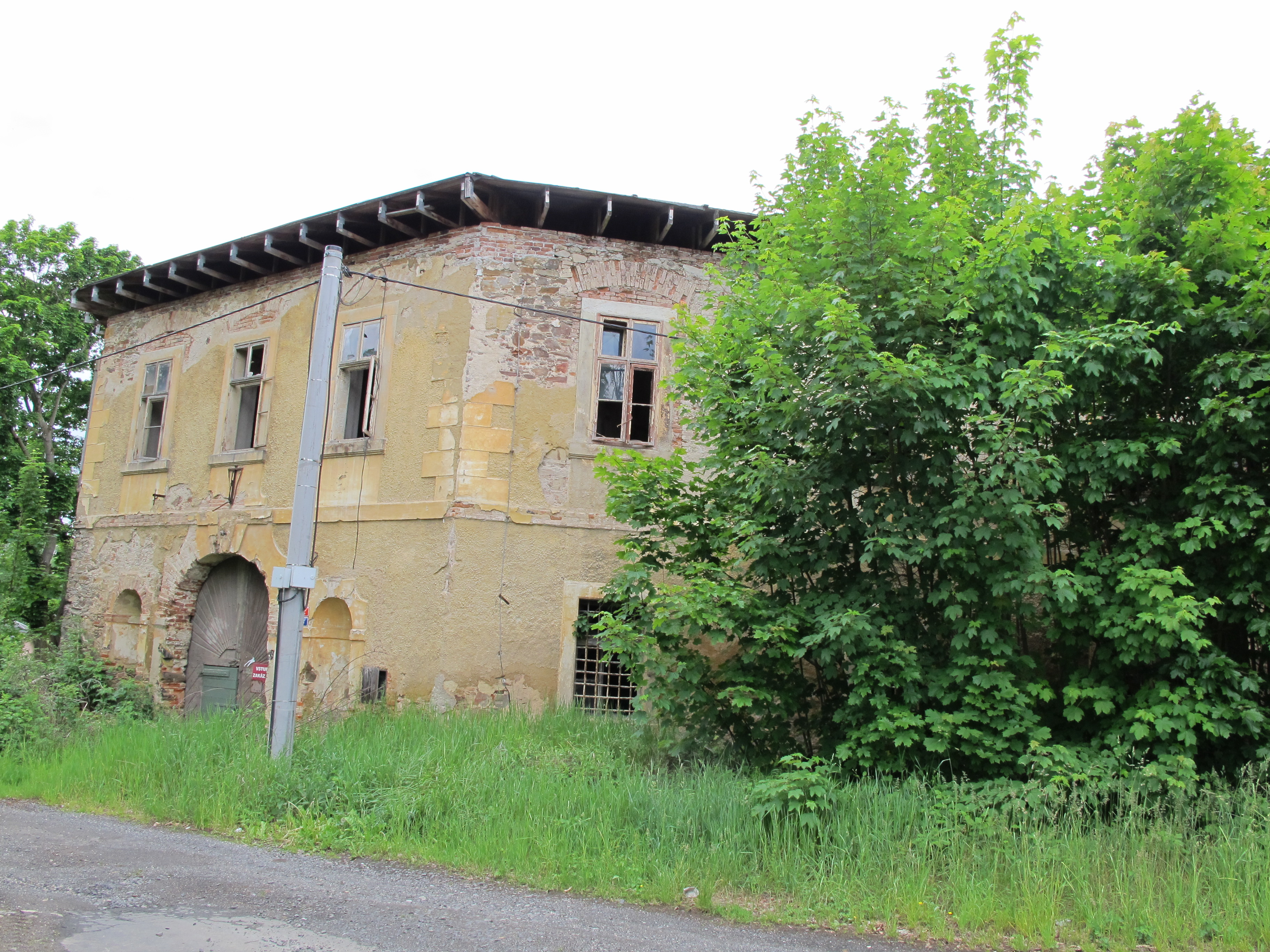 Zámek Hammerhof, Mariánské Lázně–Hamrníky, třída Vítězství 1/2, Hamrníky. This image was acquired during the event Wikiměsto Mariánské Lázně.